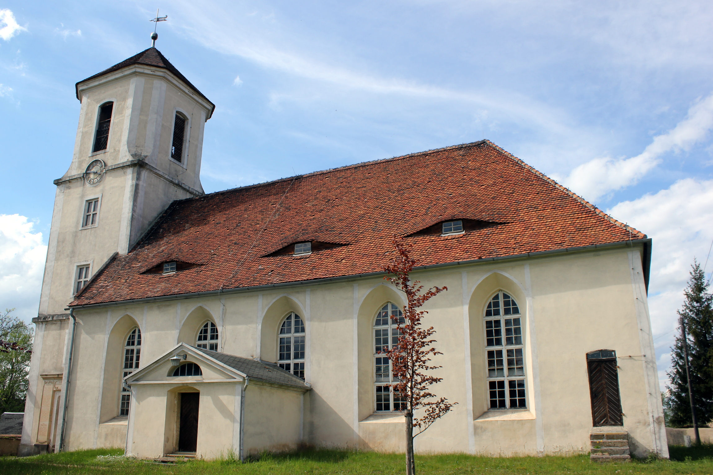 Hornjoserbsce: Bart; ewangelska cyrkej.